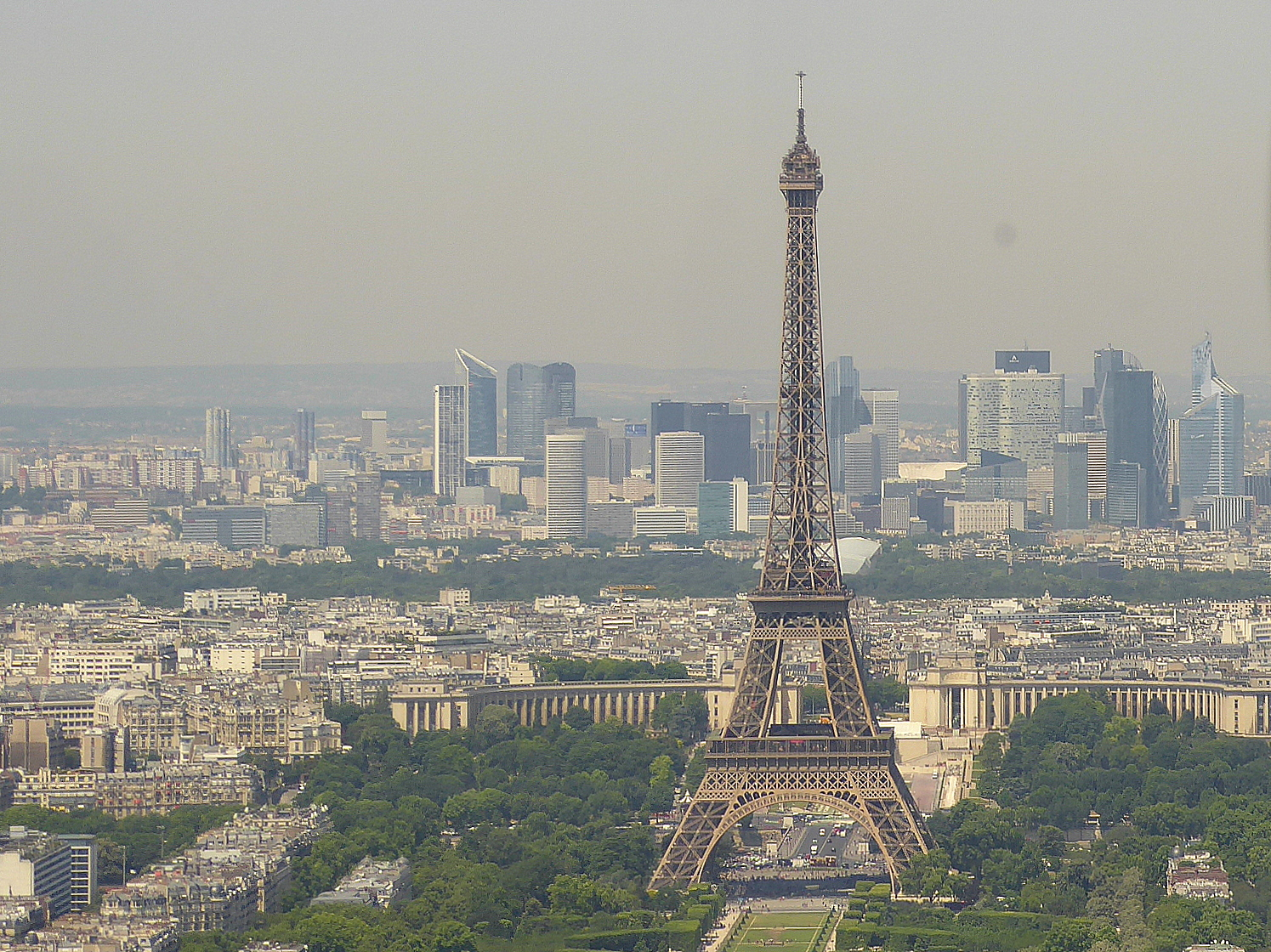 Blick vom "Ciel de Paris " auf Paris- Eiffelturm, Champs de Mars...La Défense...bei vor Hitze schwirrender Luft , 39,7°C, am 01.07.2015, dem zweitheißesten Tag seit 1873 .